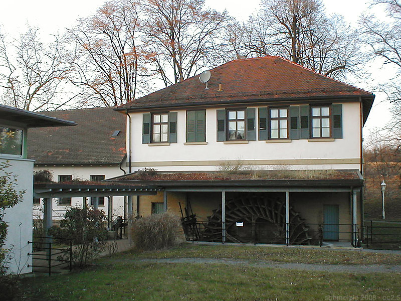 Historisches Pumpwerk in Heilbronn-Neckargartach